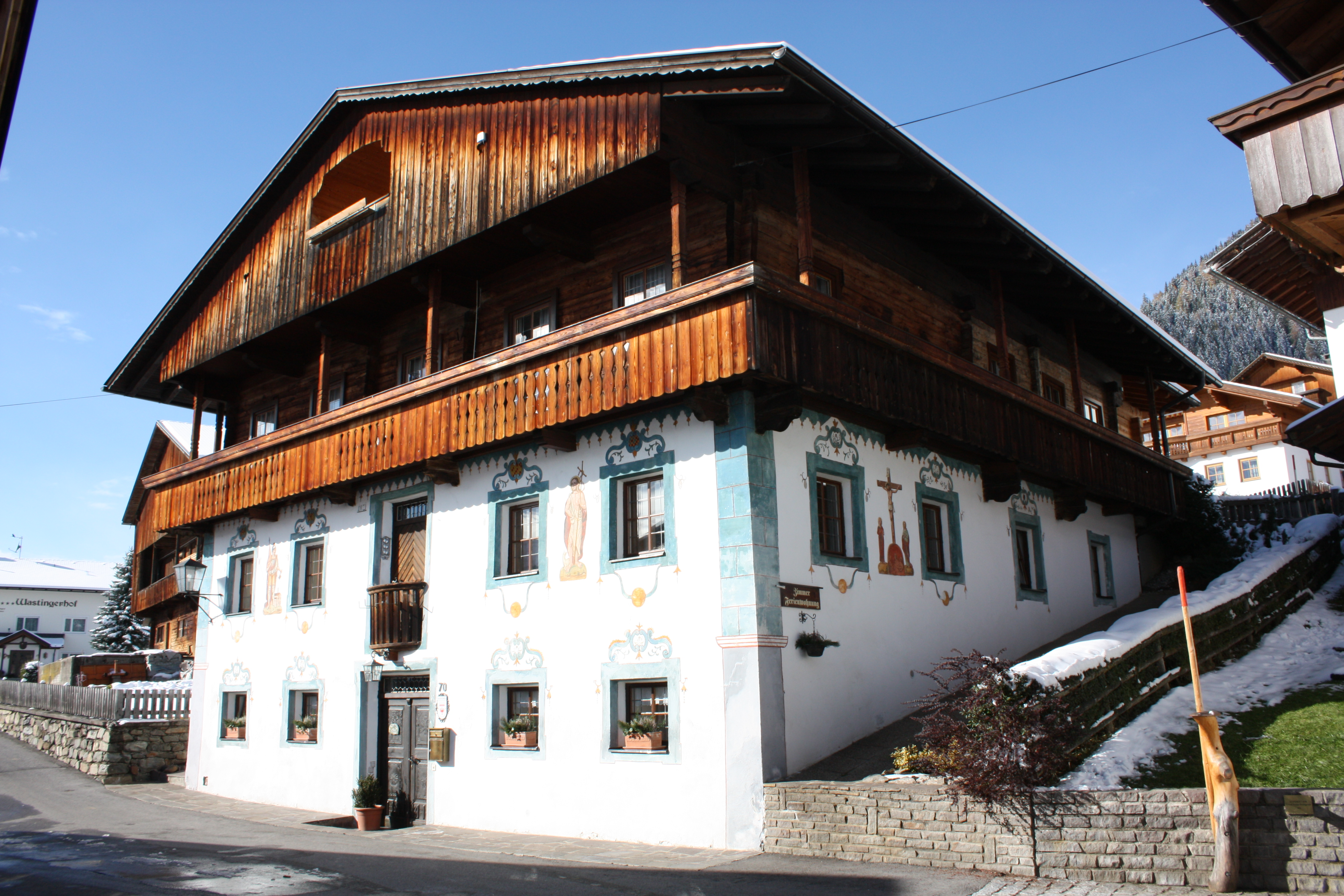 Bauernhaus Wastginer